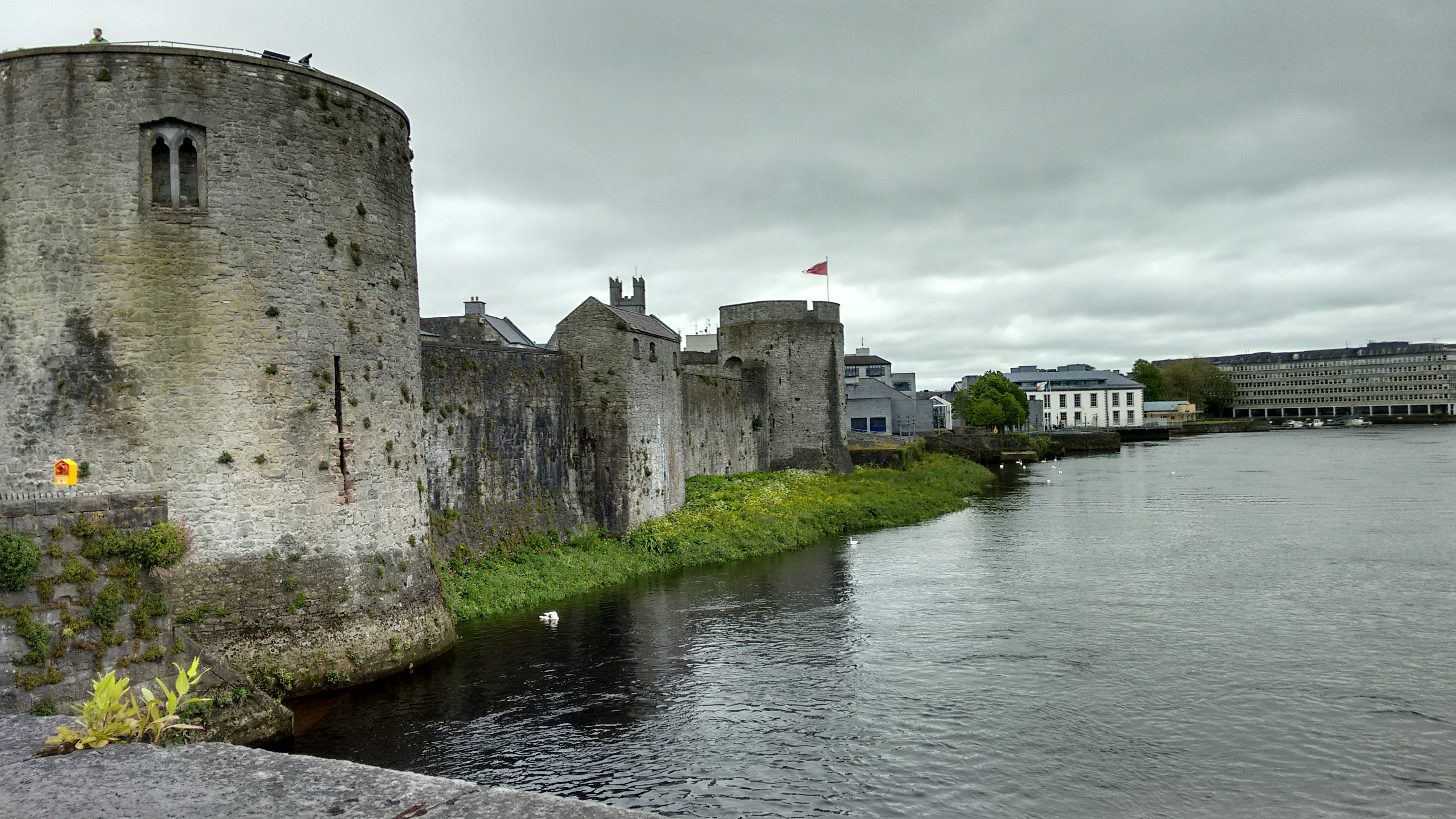 Imagem original 2 para aplicação do filtro de Kuwahara